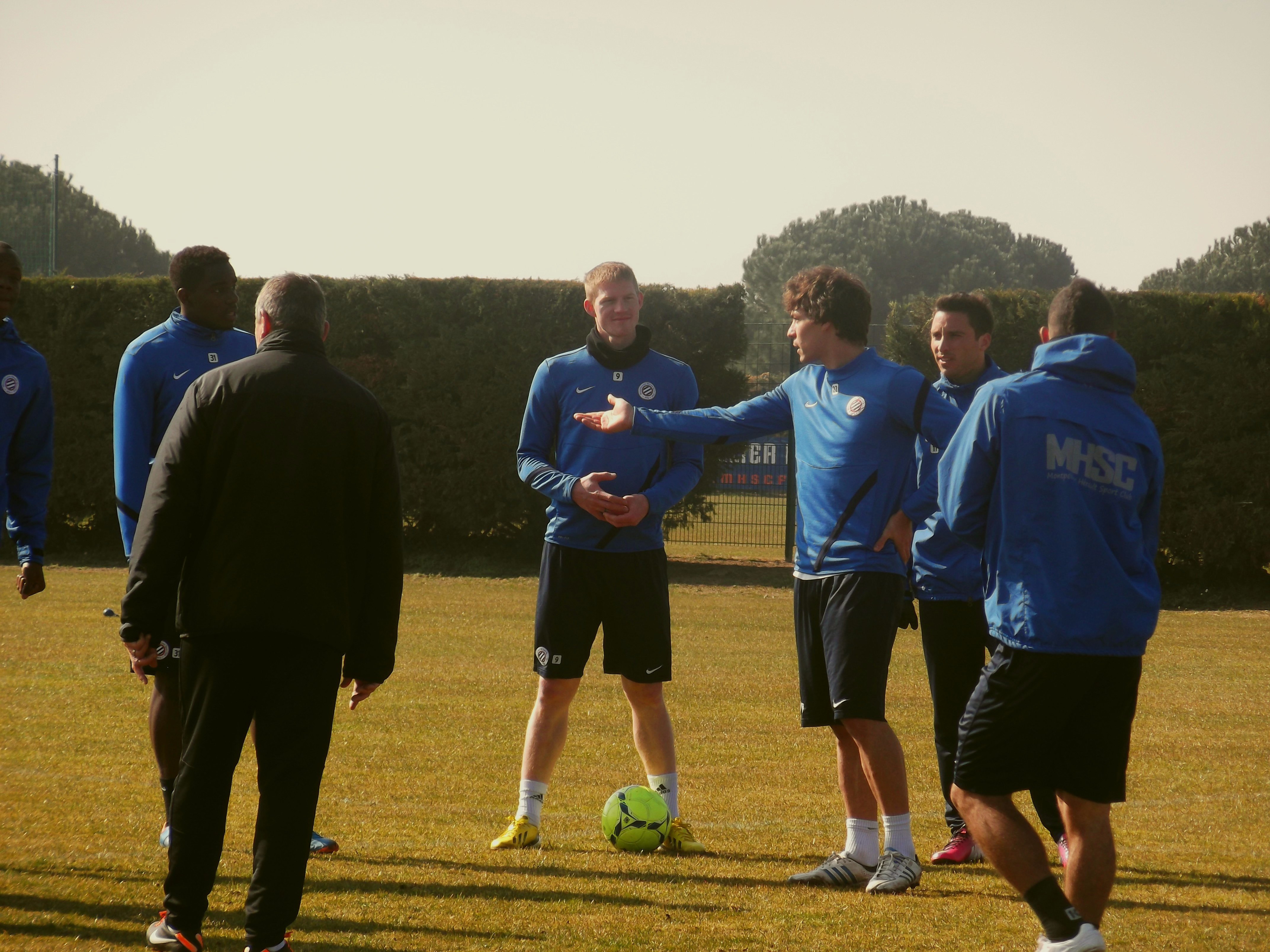 Grammont : entraînement des joueurs du MHSC.